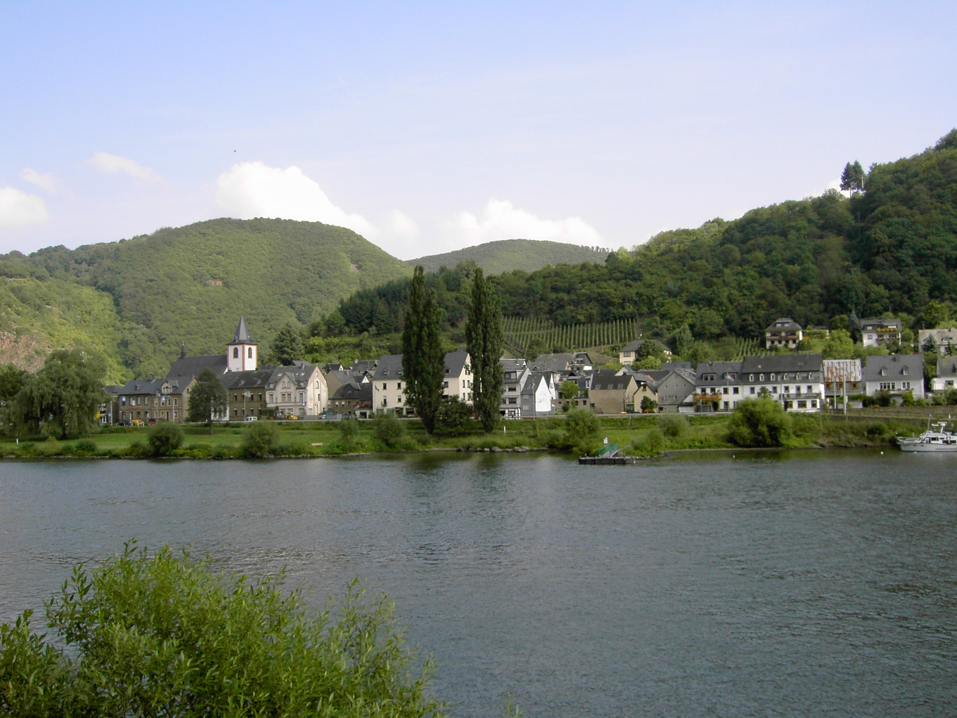 Burgen (Mosel) vom anderen Ufer aus gesehen